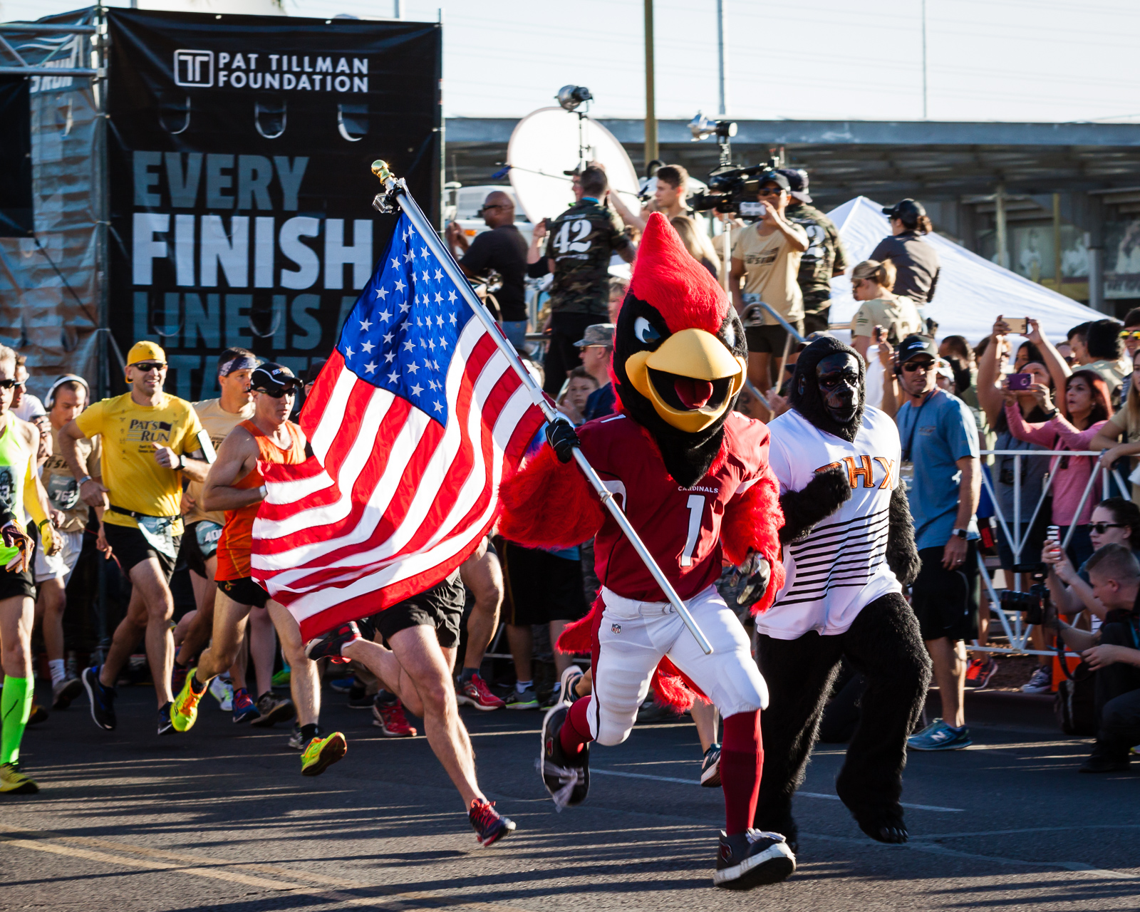 Pats Run 2017, ASU, Tempe AZ